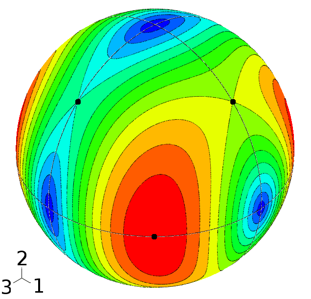 Auf eine Kugel projizierte Schubspannungen bei den Hauptspannungen σ1 = 4, σ2 = 0 und σ3 = -2